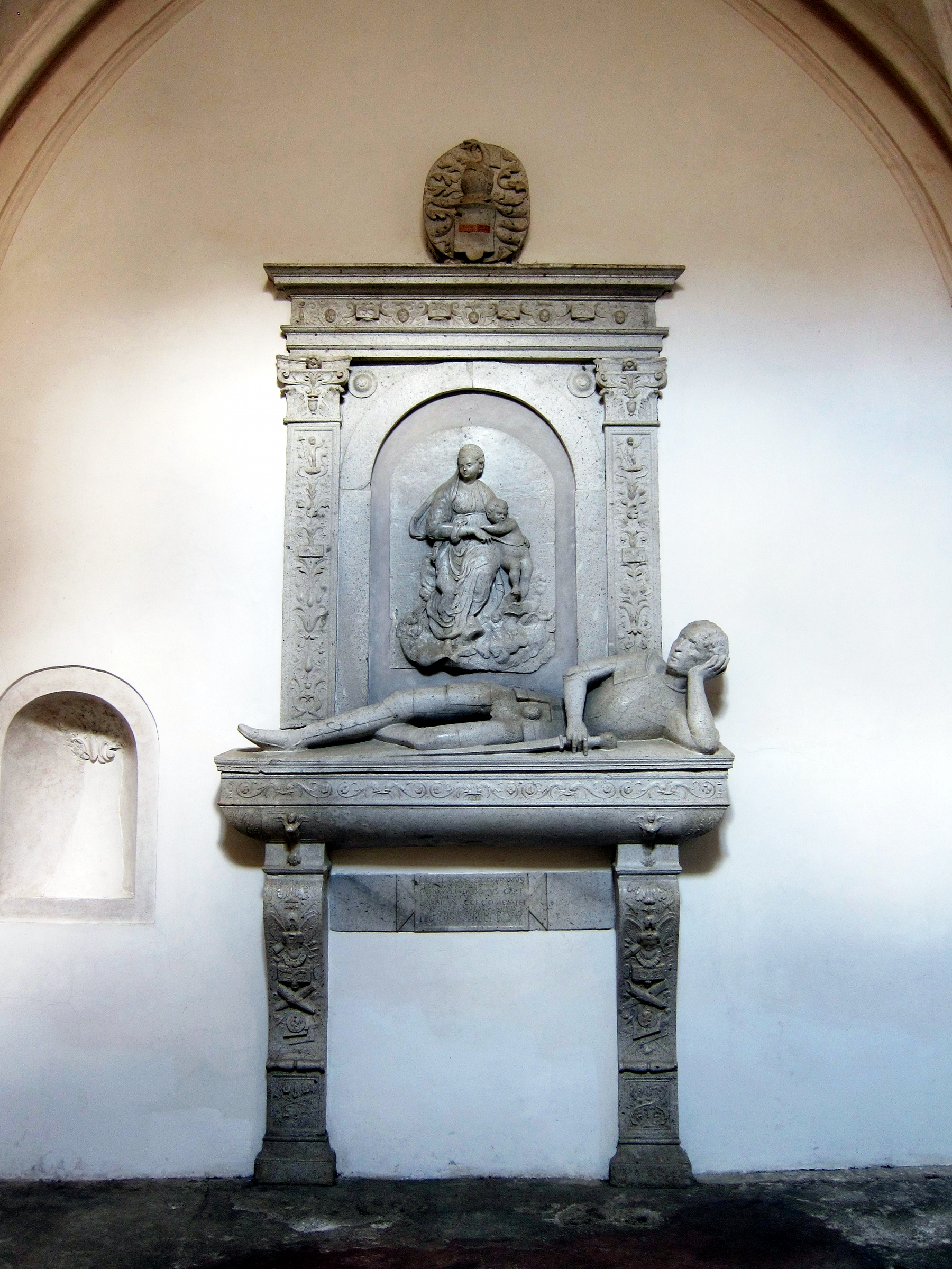 Sculpture dans la Certosa di San Lorenzo (Padula).